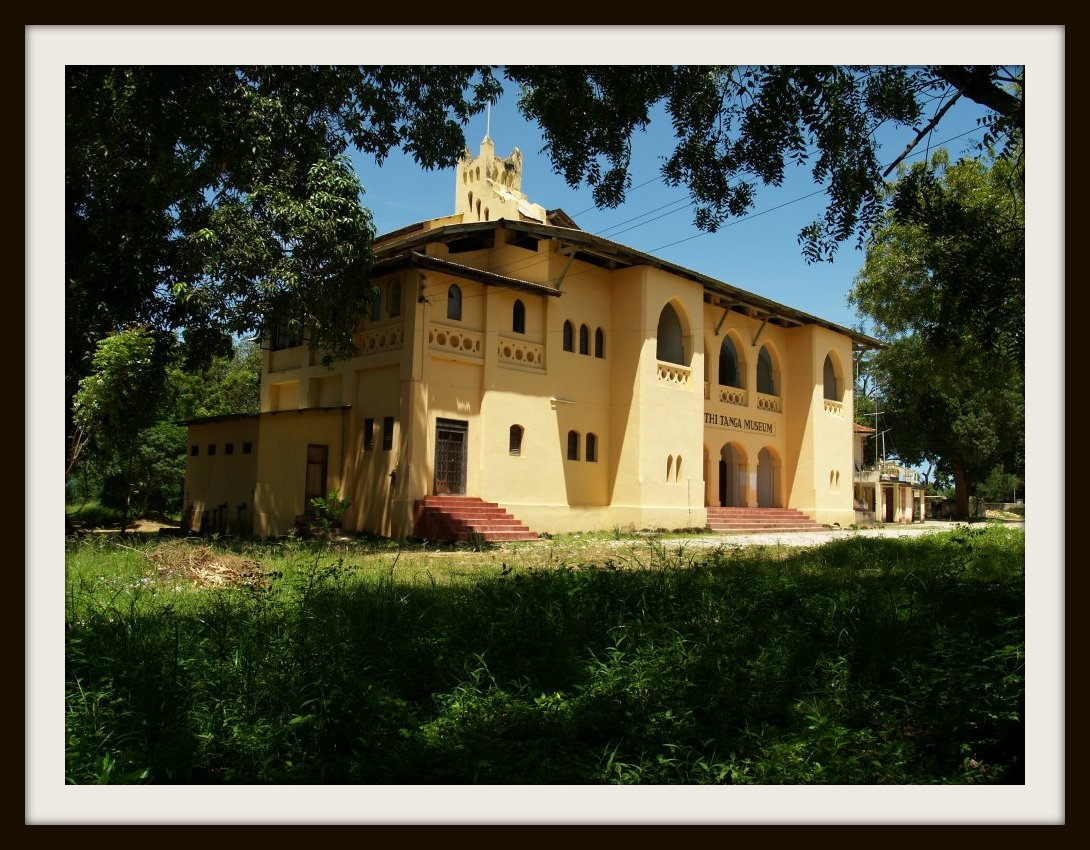 Kiswahili: Hili ni jengo la makumbusho ya Urithi wa Tanga, limejengwa mwaka 1890. Picha imepigwa na Joel Niganile